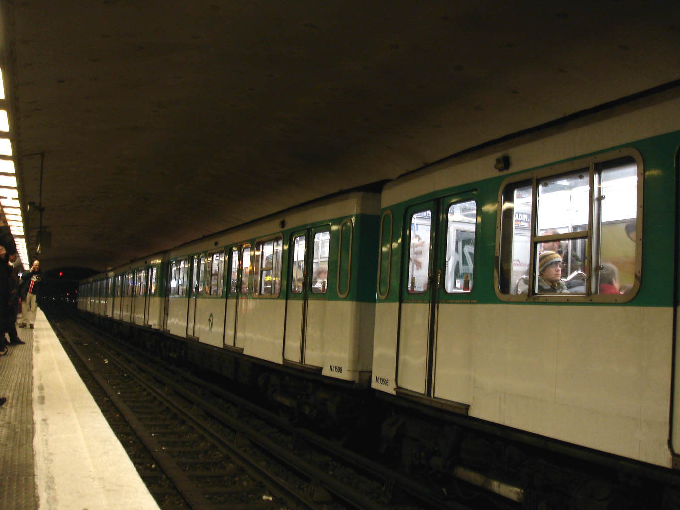 Métro de Paris (France) - ligne 5 - MF 67 à la station République